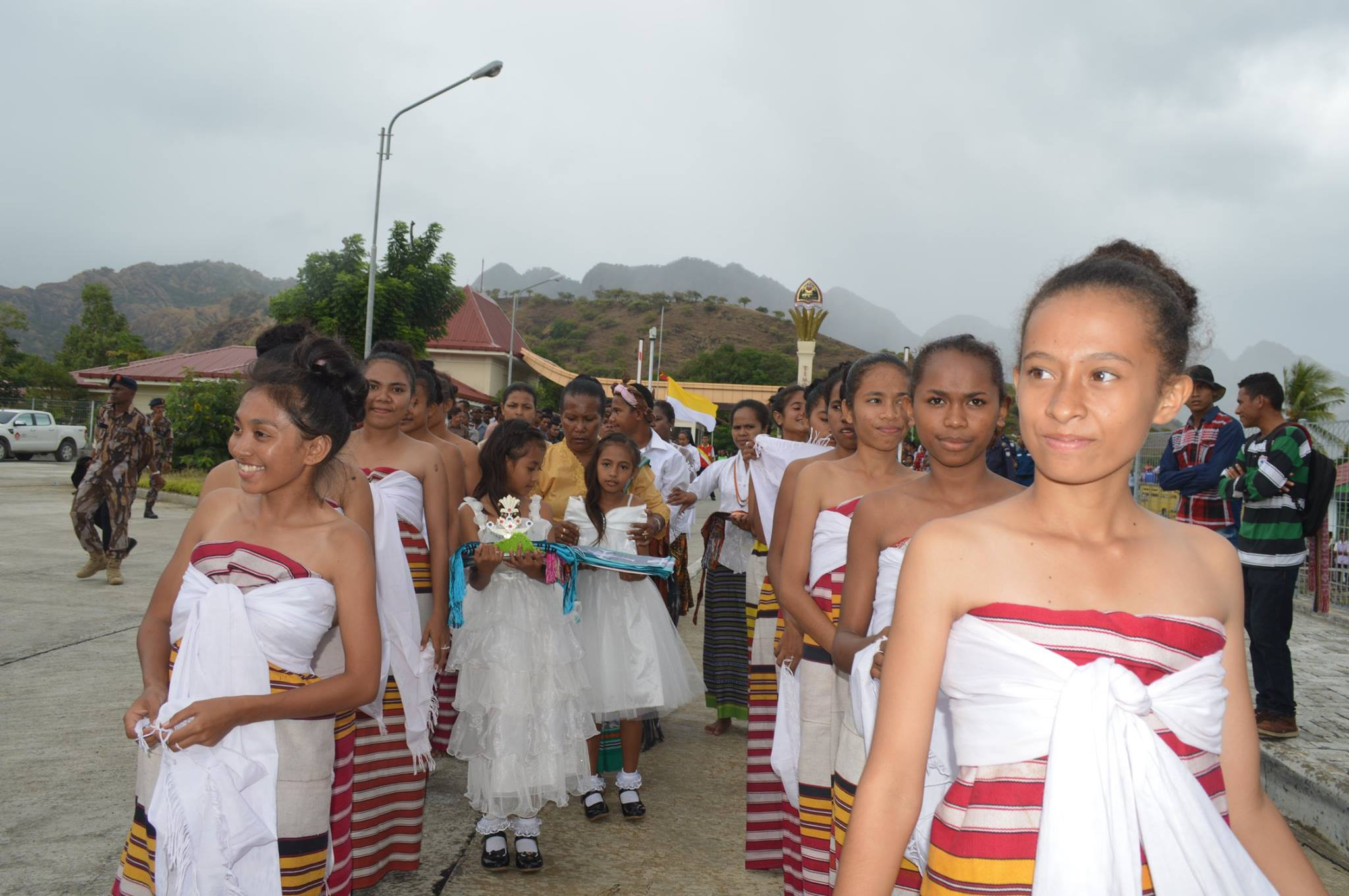 Traditionelle Festtagskleidung in Oecusse